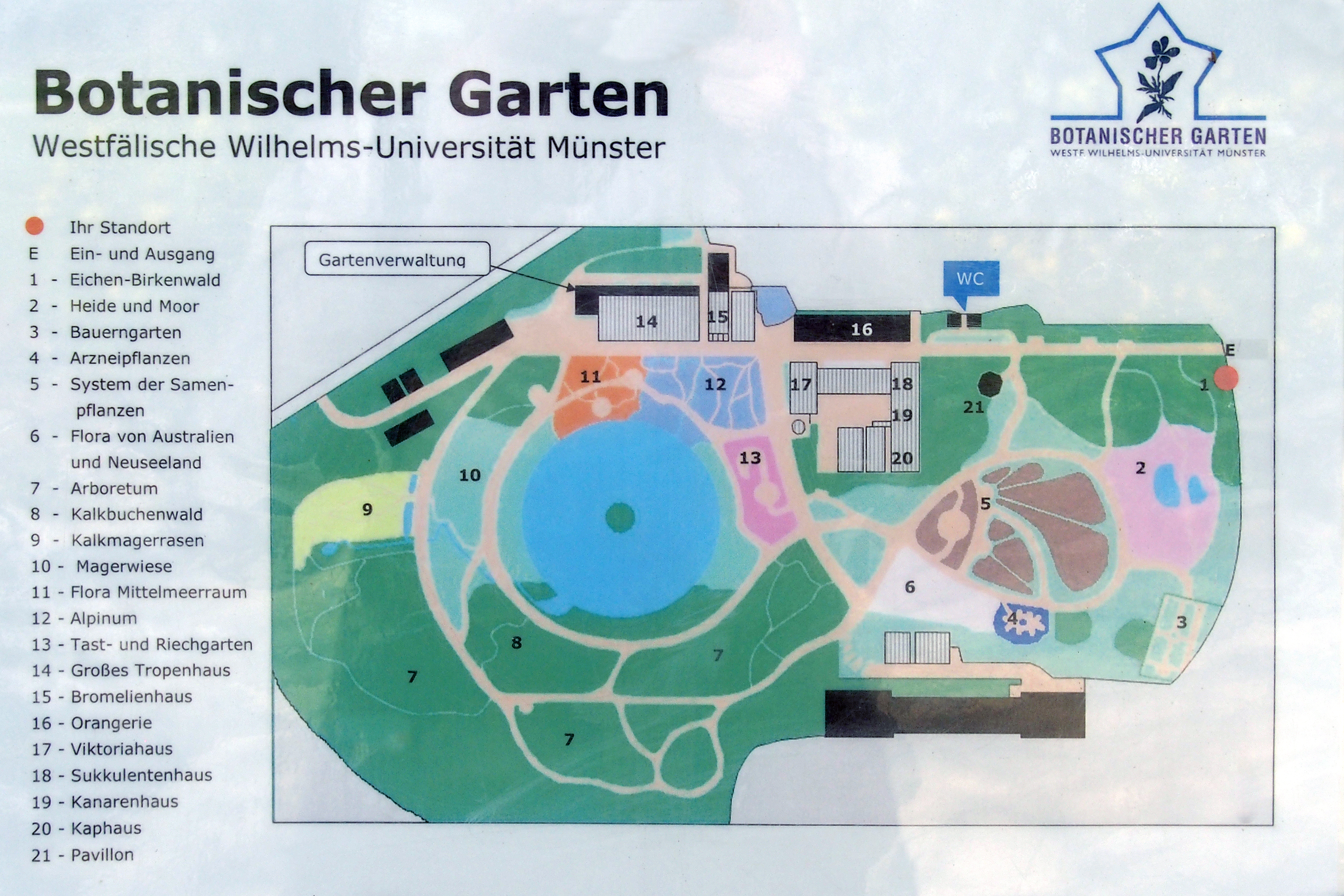 Übersichtsplan des Botanischen Gartens am Schloss Münster (Westfalen)